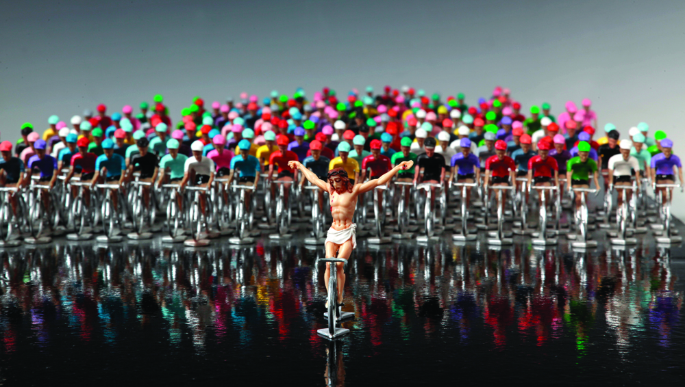 "Les premiers seront les derniers", Vincent Solheid, 2011. Photo JJ Sérol